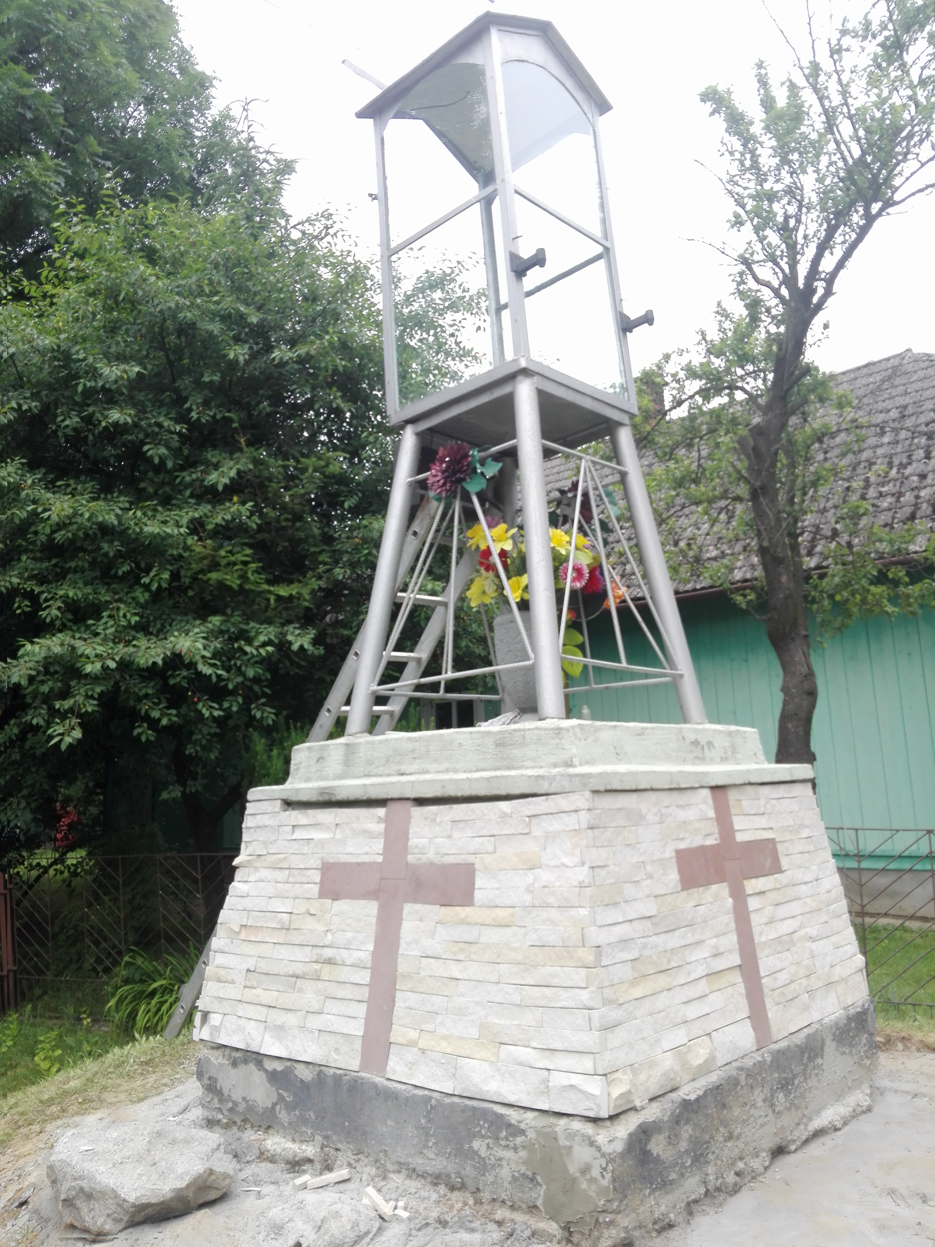 remont kapliczki w czerwcu 2017